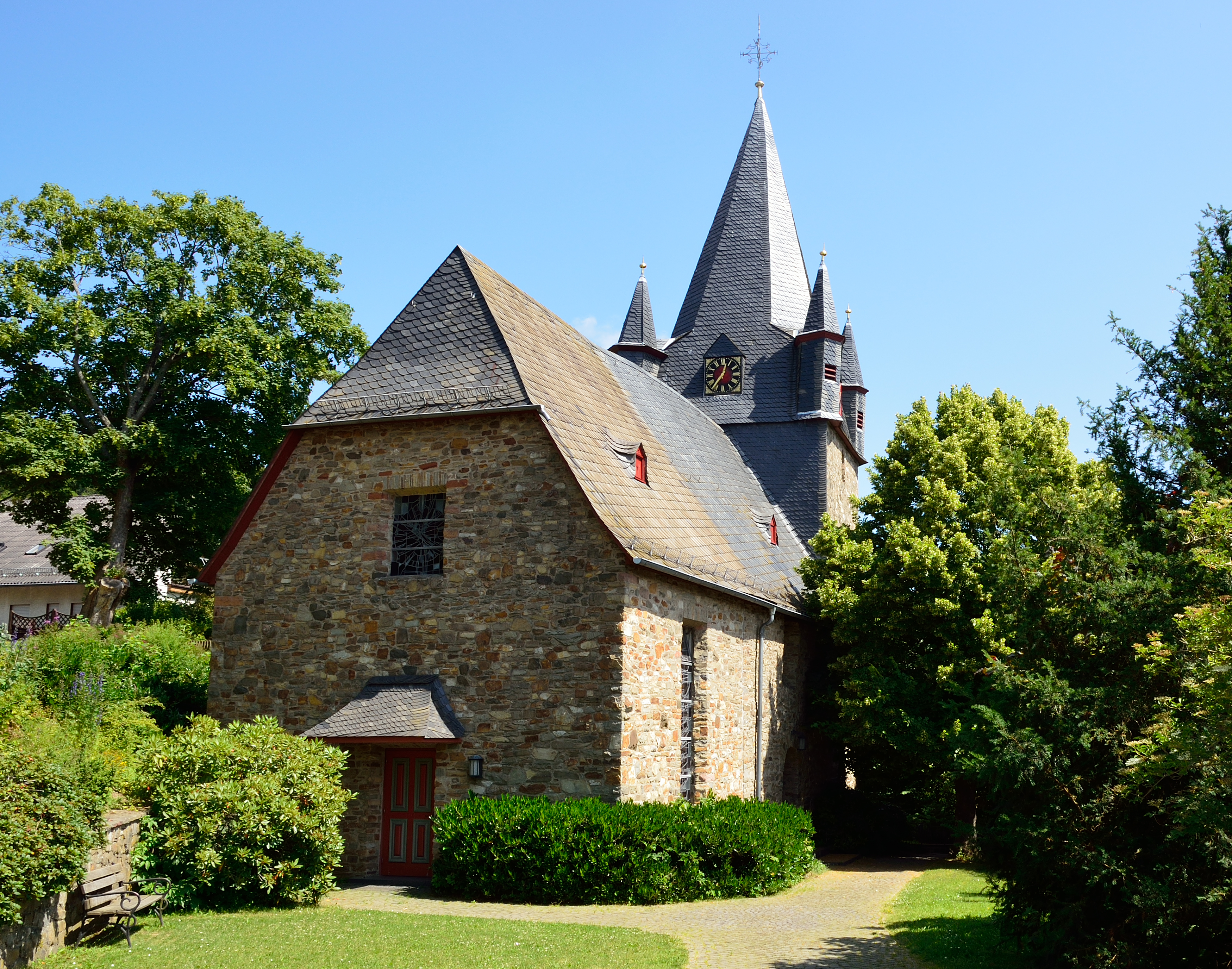 Die ev.-luth. Kirche in Lixfeld